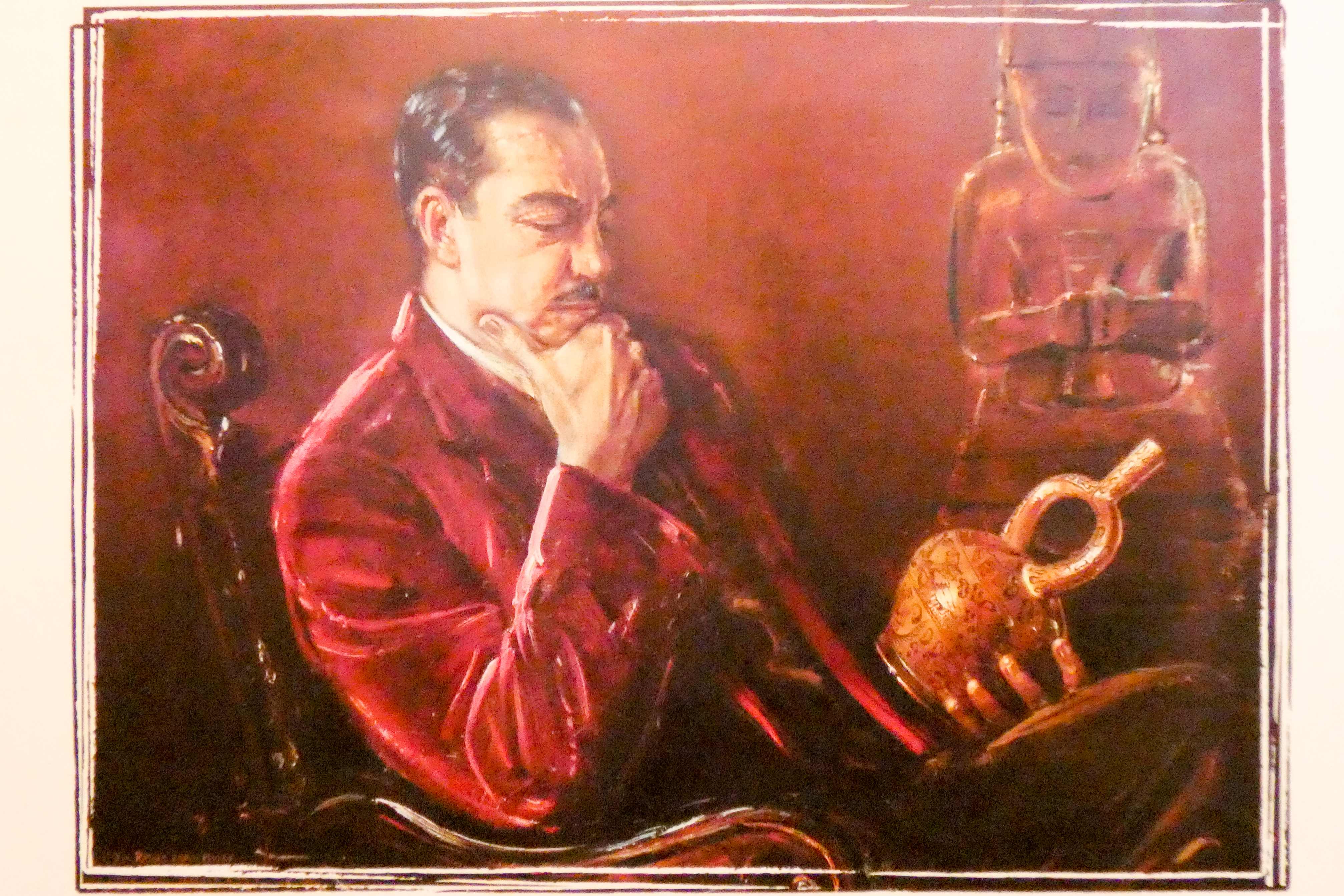 Portrait du fondateur